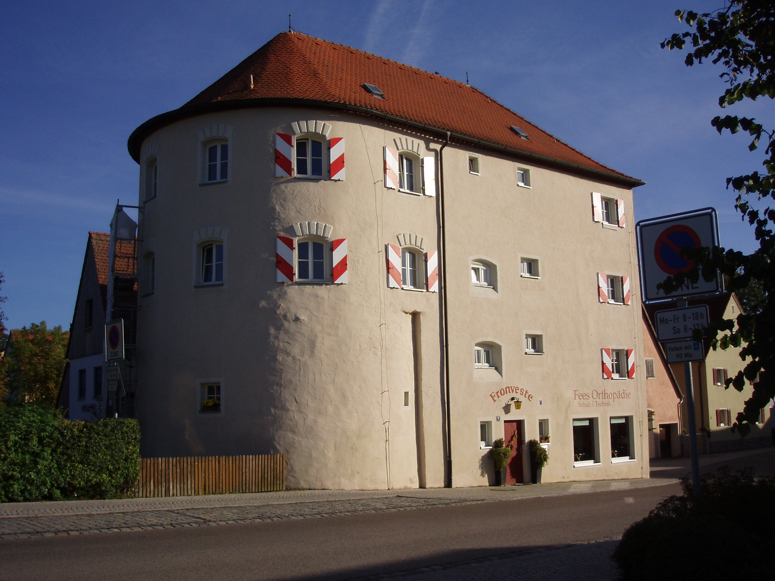 ehemaliges Gefängnis in Herrieden